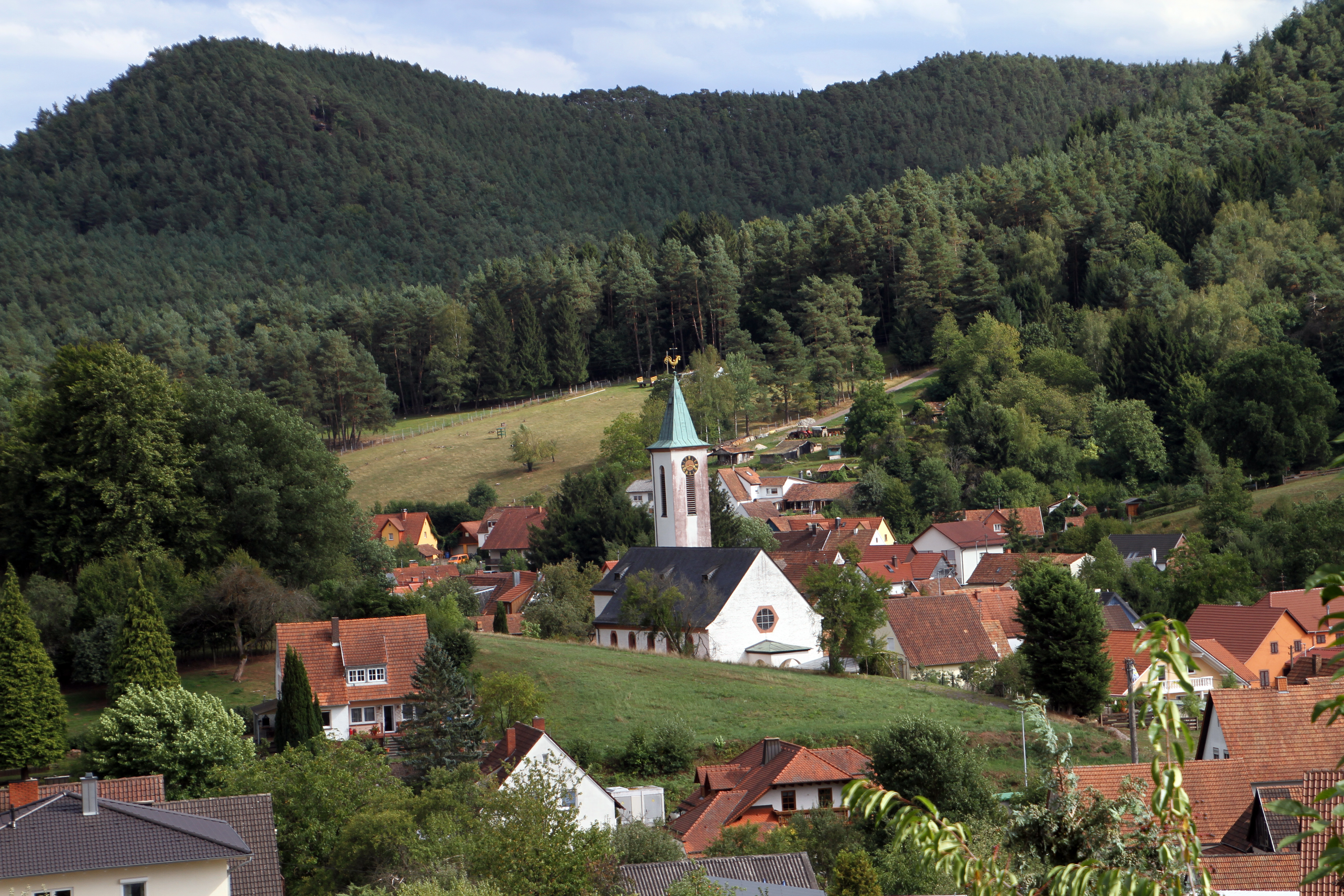 Schindhard, Hauptstraße, hinter Nr. 47; katholische Kirche St. Antonius; fünfachsiger Saalbau, 1927/28.